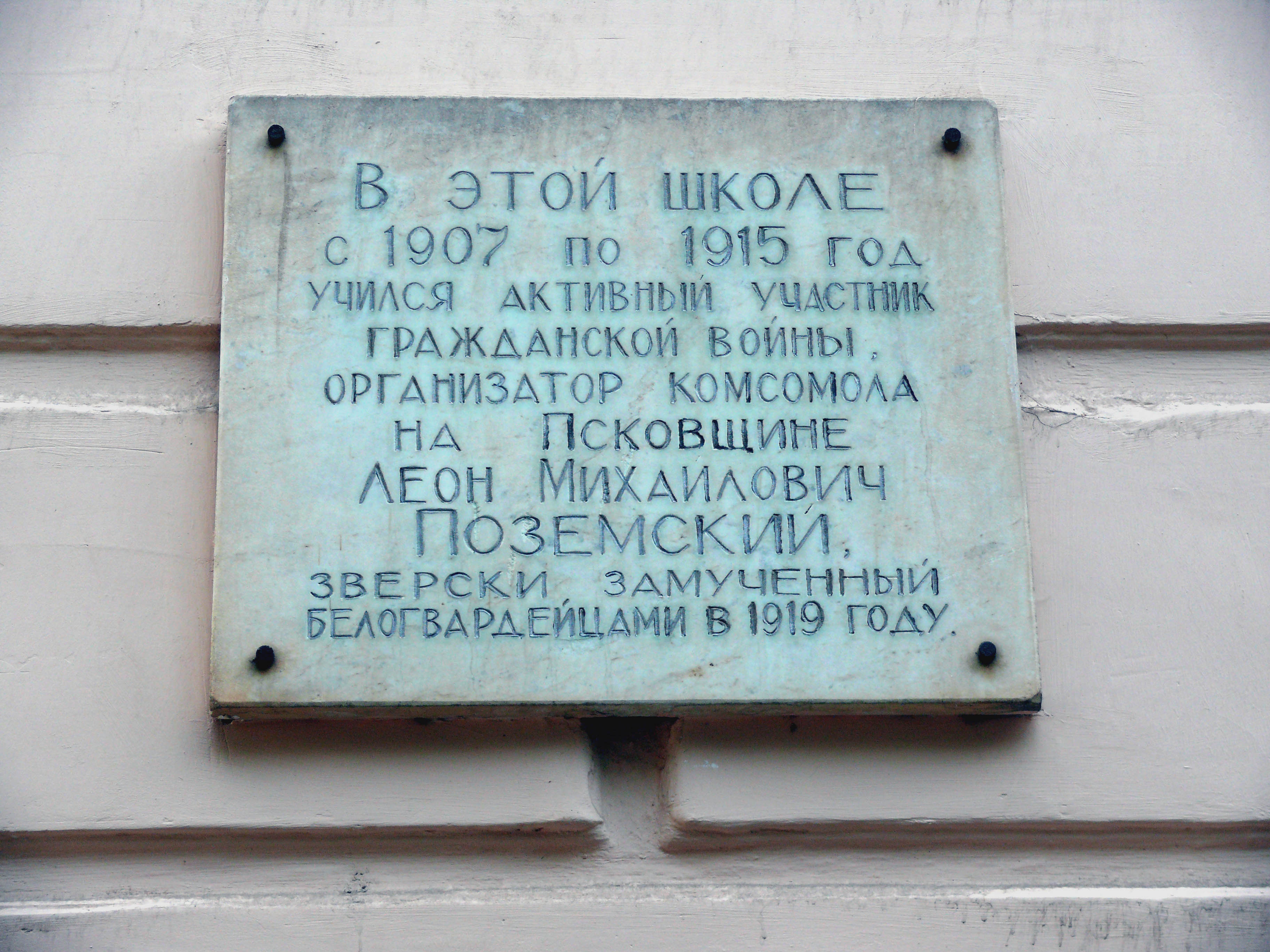 Псков. Памятная доска на Мужской гимназии